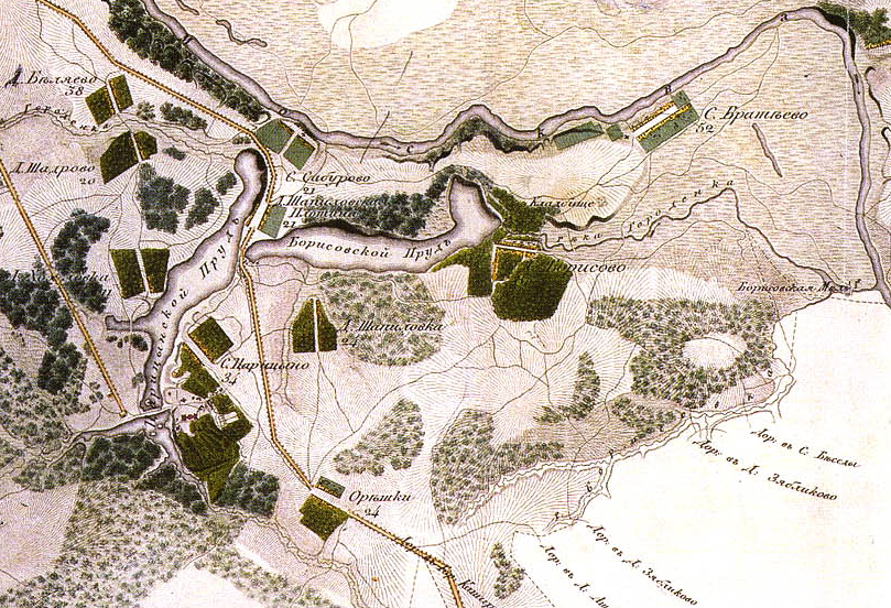 Участок. Топографическая карта окружности Москвы, снятая офицерами Квантирмейстерской части 1818 года. Гравирована и печатана в военно-топографическом бюро при главном штабе его импереторского Величества 1823 года.